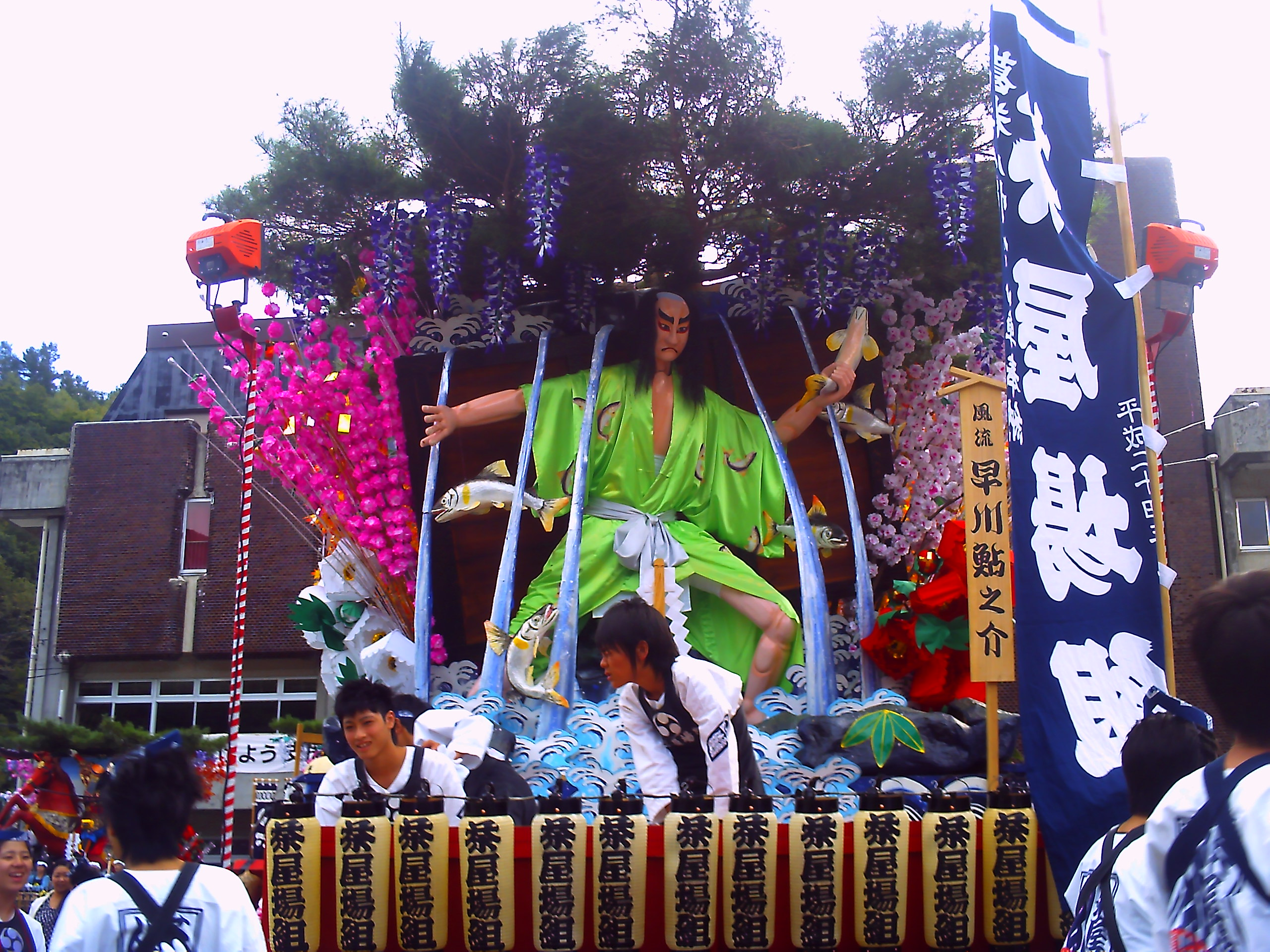 葛巻・茶屋場組山車。